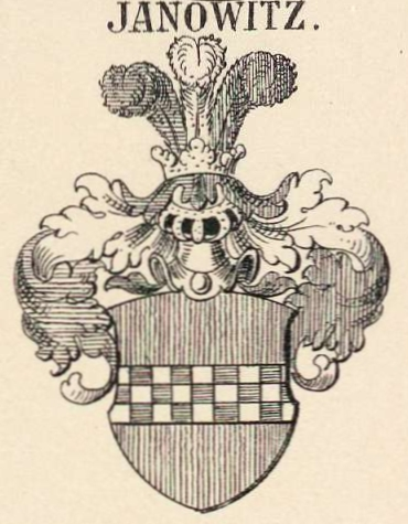 Stammwappen der württembergischen Linie des Geschlechts derer von Janowsky. In Rot ein silber-blau in drei Reihen geschachter Querbalken. Gekrönter Helm: drei Straußenfedern in Blau, Silber bzw. Rot. Decken: links blau-weiß, rechts rot-weiß.